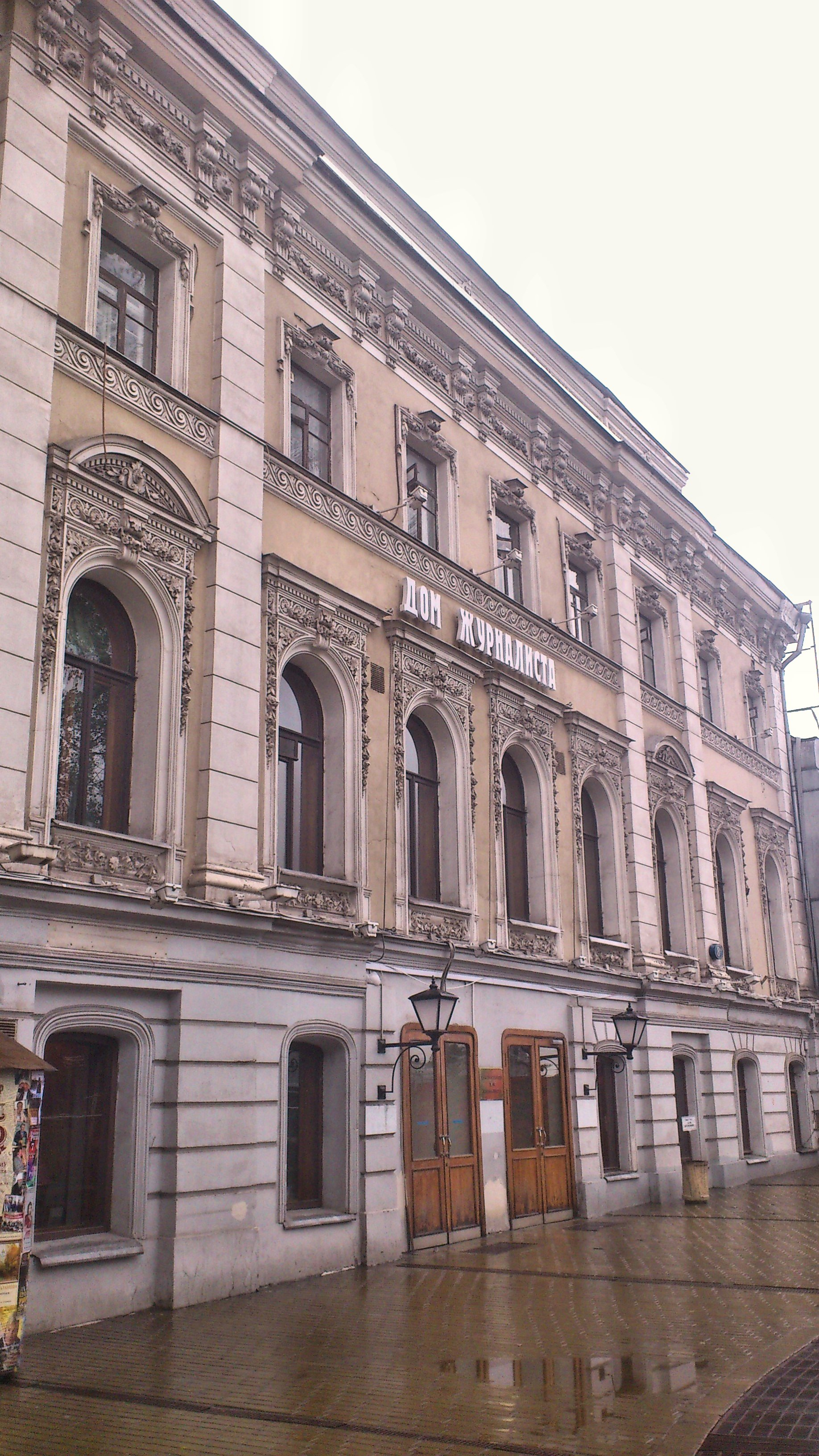 Центральный Дом журналиста. Москва, Никитский бульвар, 8а.